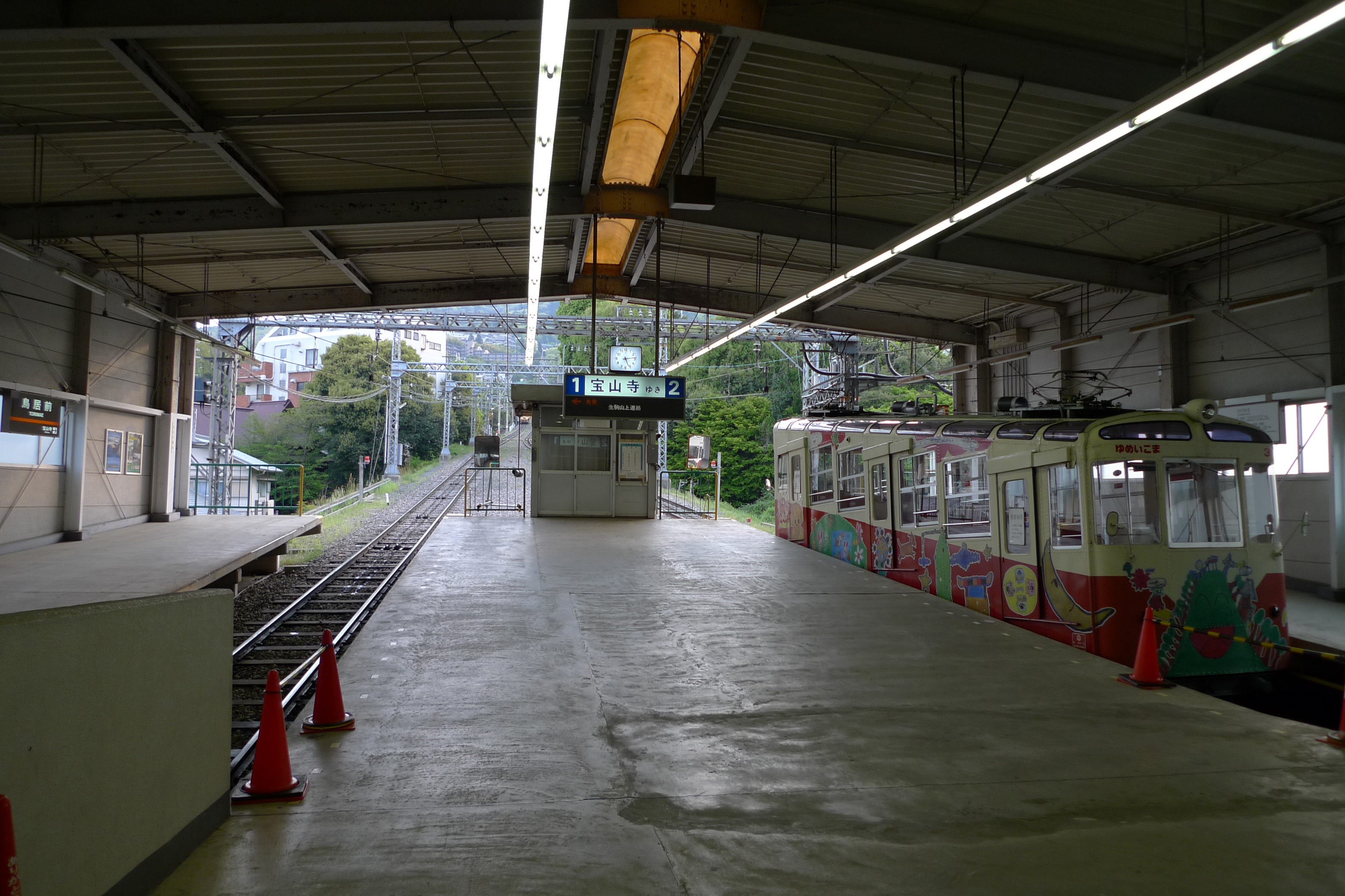 近鉄生駒鋼索線宝山寺線鳥居前駅ホーム